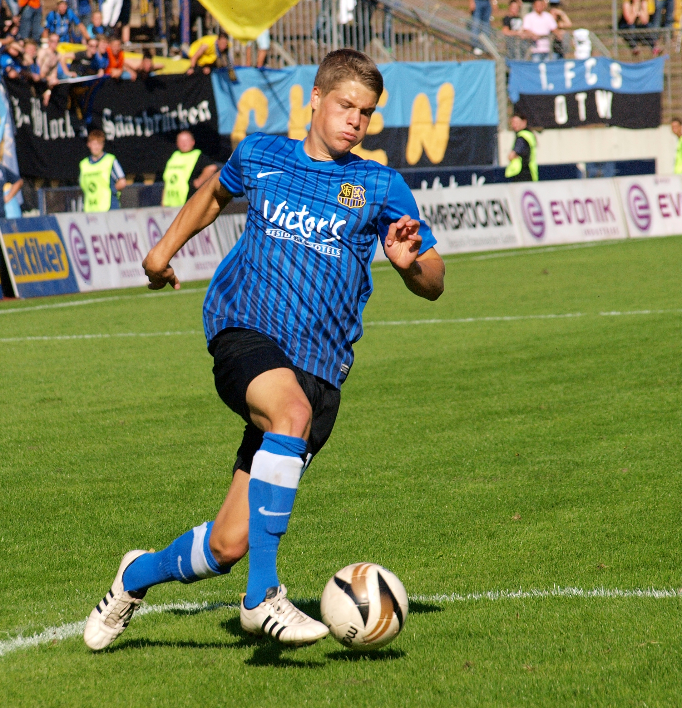 Johannes Wurtz beim Spiel 1.FC Saarbrücken - Wehen Wiesbaden